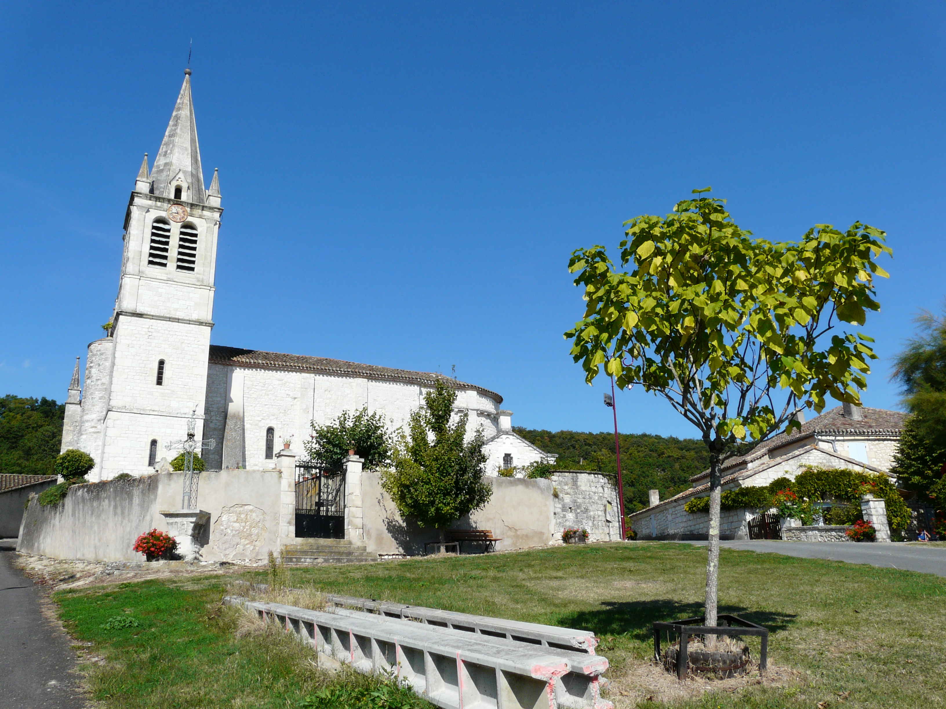 Église de Cazideroque